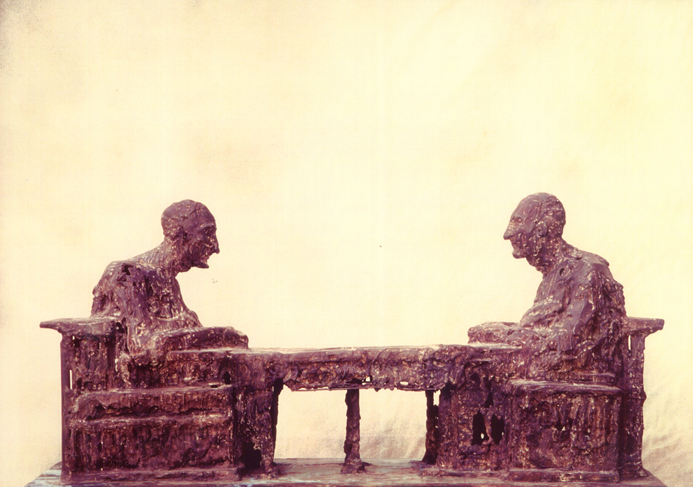 1998-1999. 58X120X44